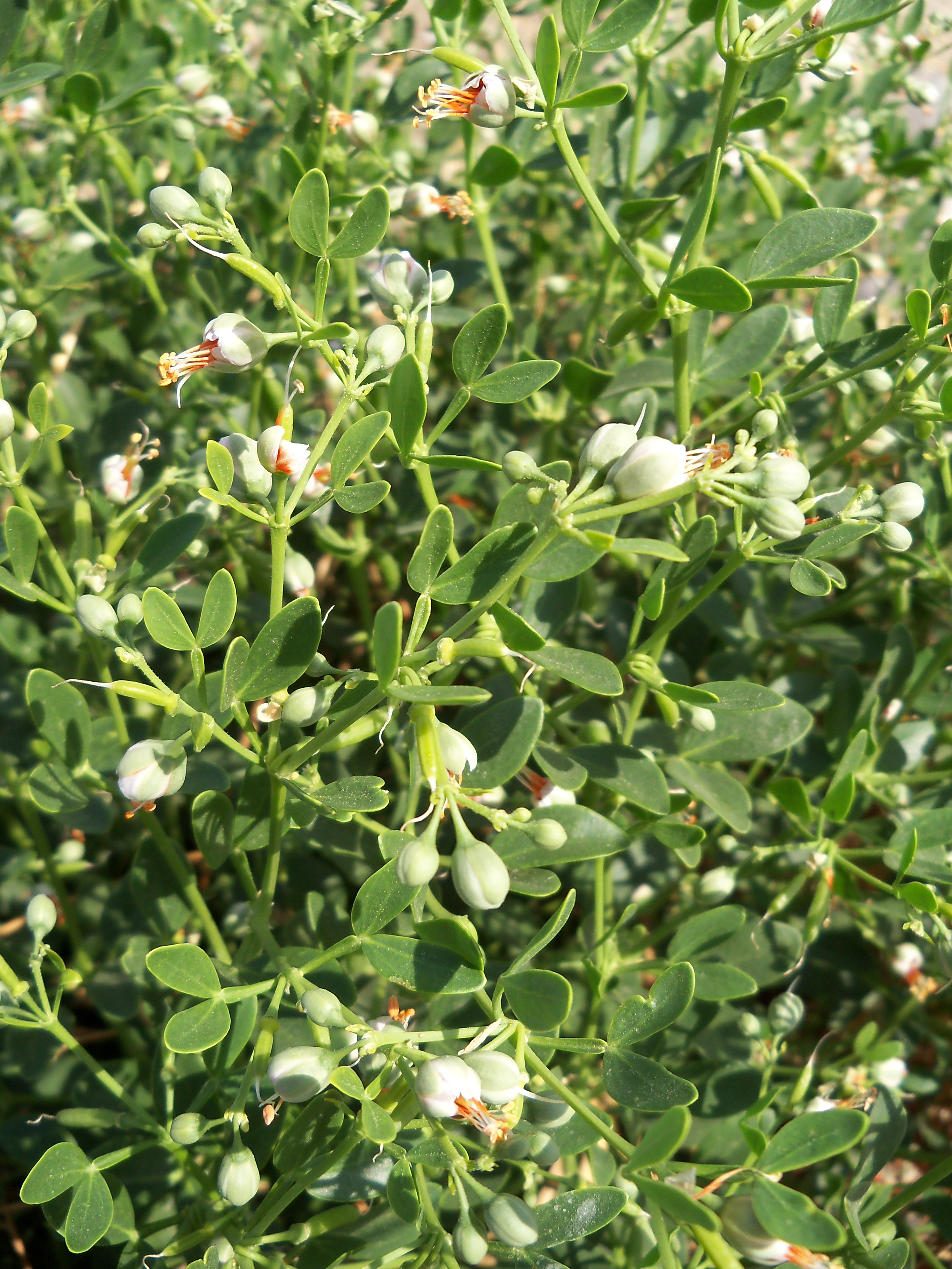 Zygophyllum fabago (Morsana) : Aspecto general en flor - Circunvalación Norte, Águilas (Provincia de Murcia, España).